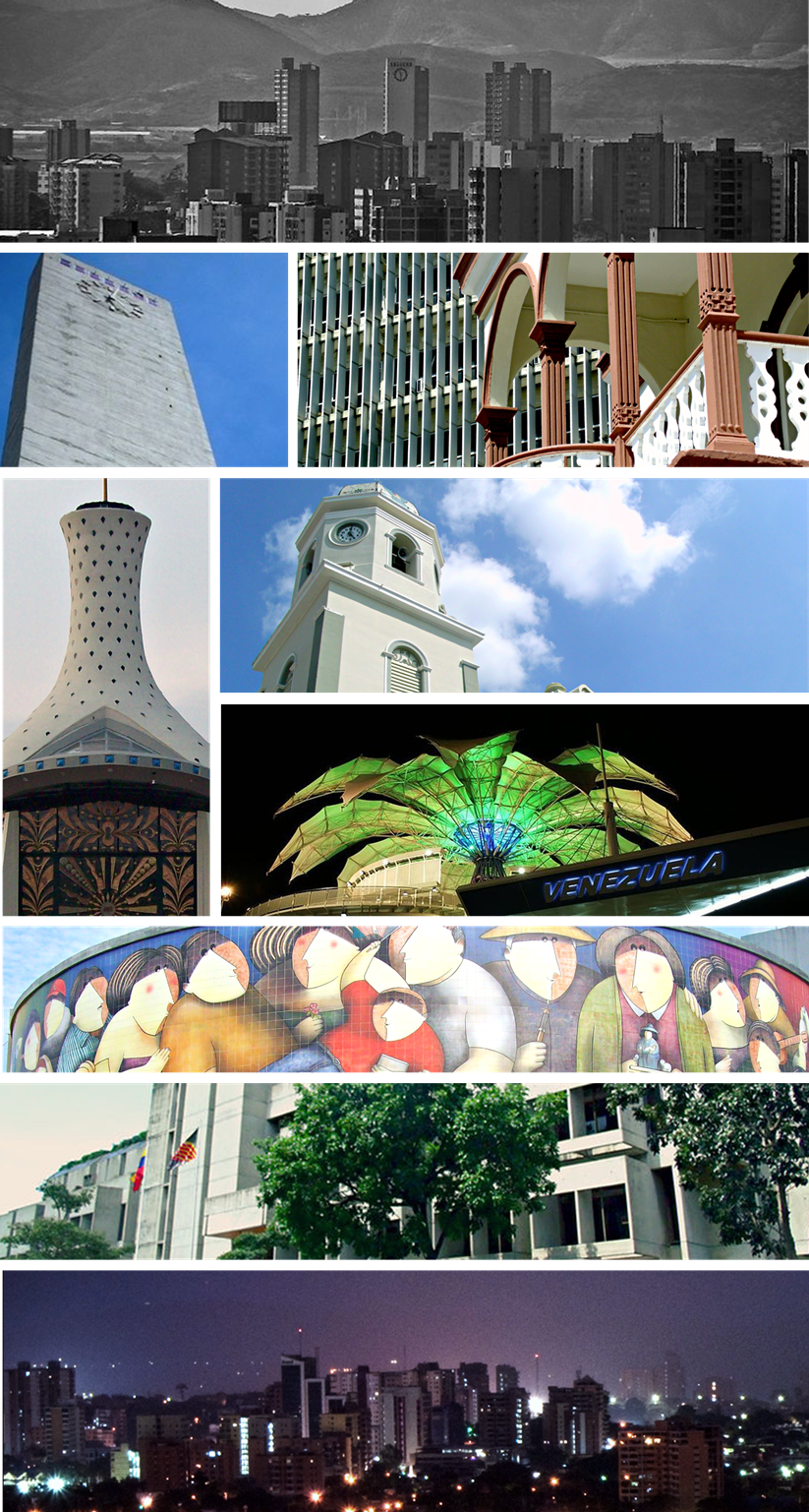 Recopilación de fotos de la ciudad venezolana de Barquisimeto.